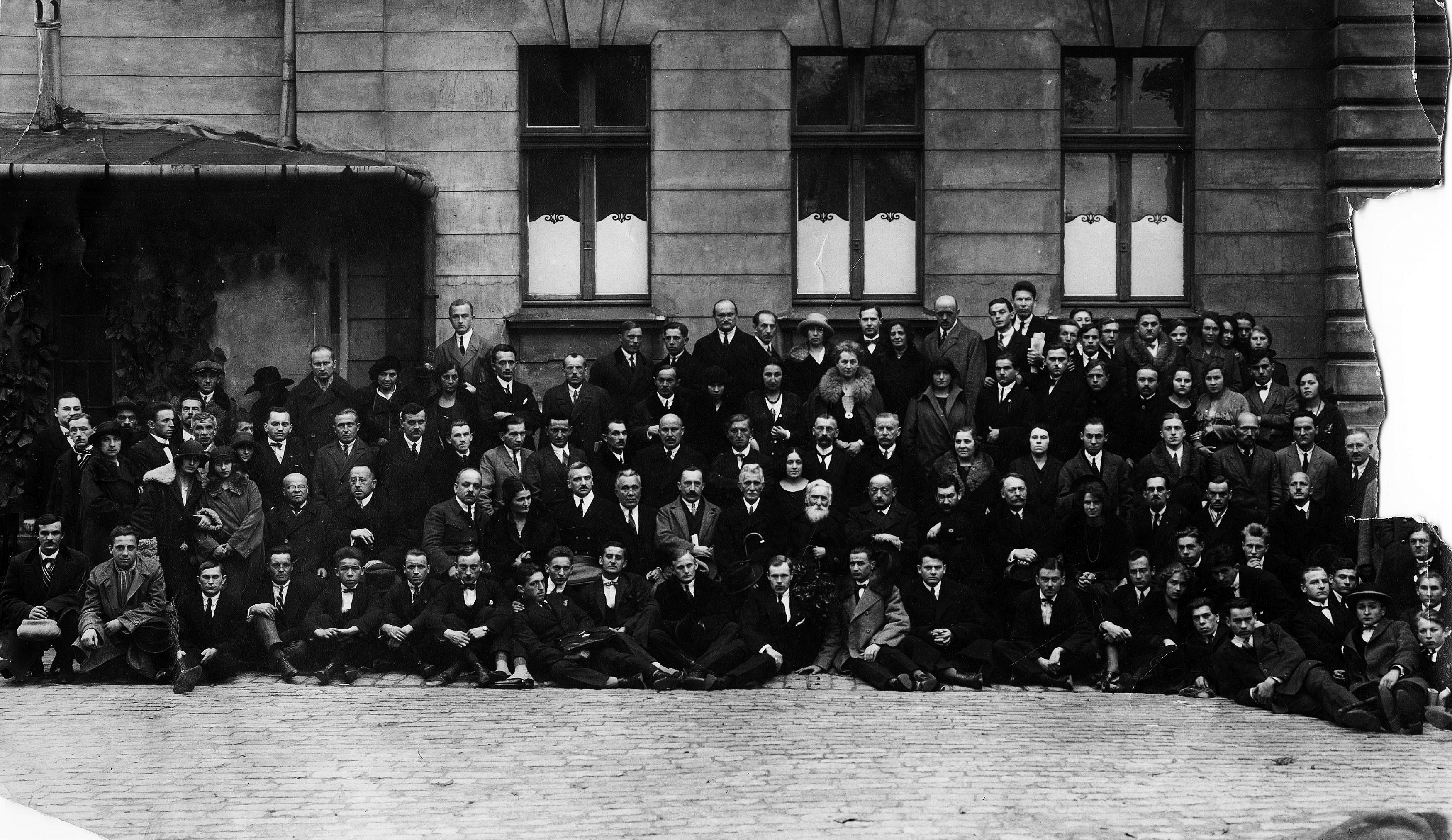 I Zjazd Towarzystwa Uniwersytetu Robotniczego w Warszawie, listopad 1924 r. pis obrazu: Uczestnicy zjazdu. Widoczni m.in. (w centralnej części fotografii): Bolesław Limanowski, Ignacy Daszyński, Kazimierz Czapiński, Feliks Perl, Stanisław Posner.